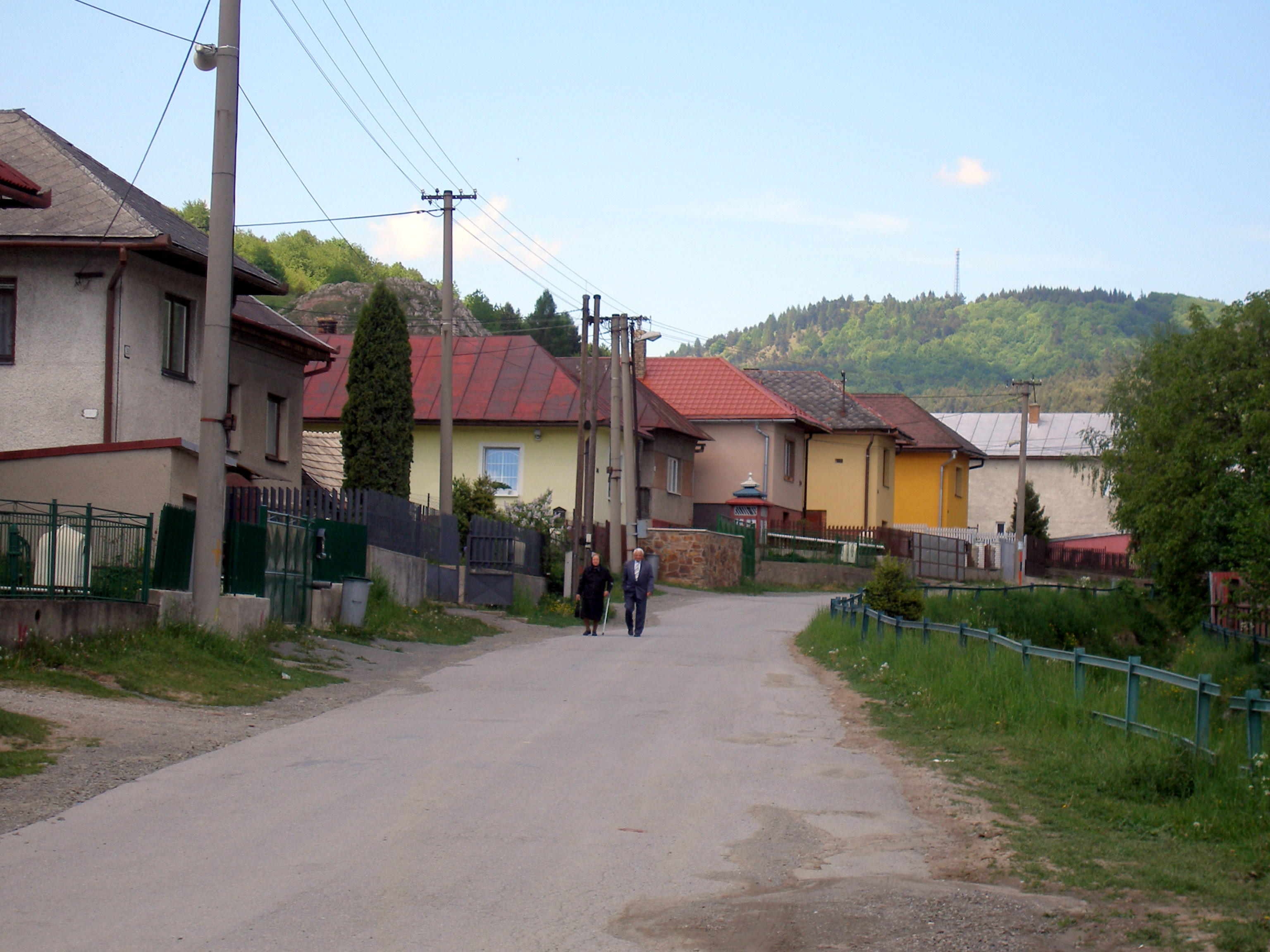 Obec Kamenica okres Sabinov.